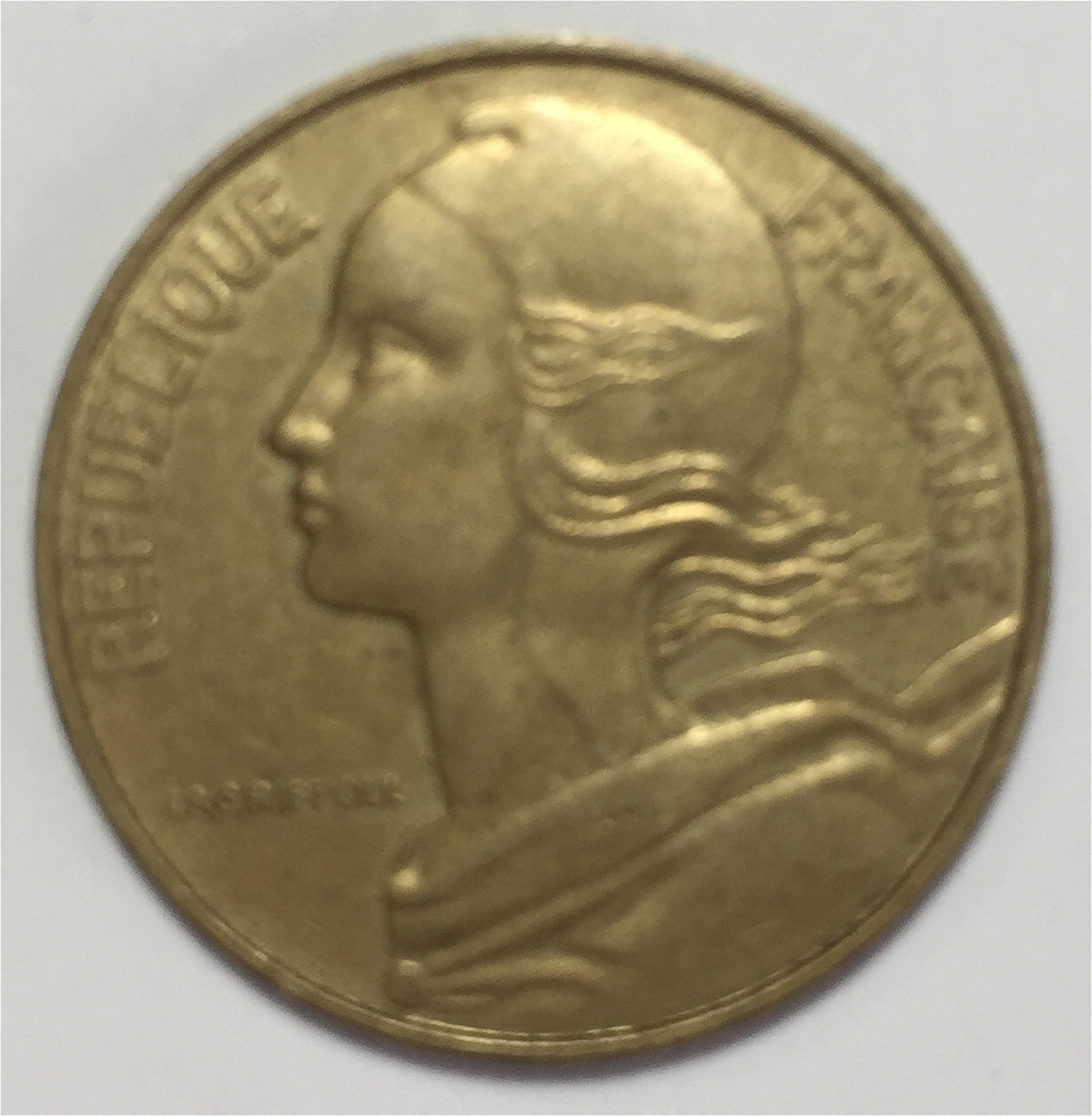 Muenze 20 Centimes (Frankreich)